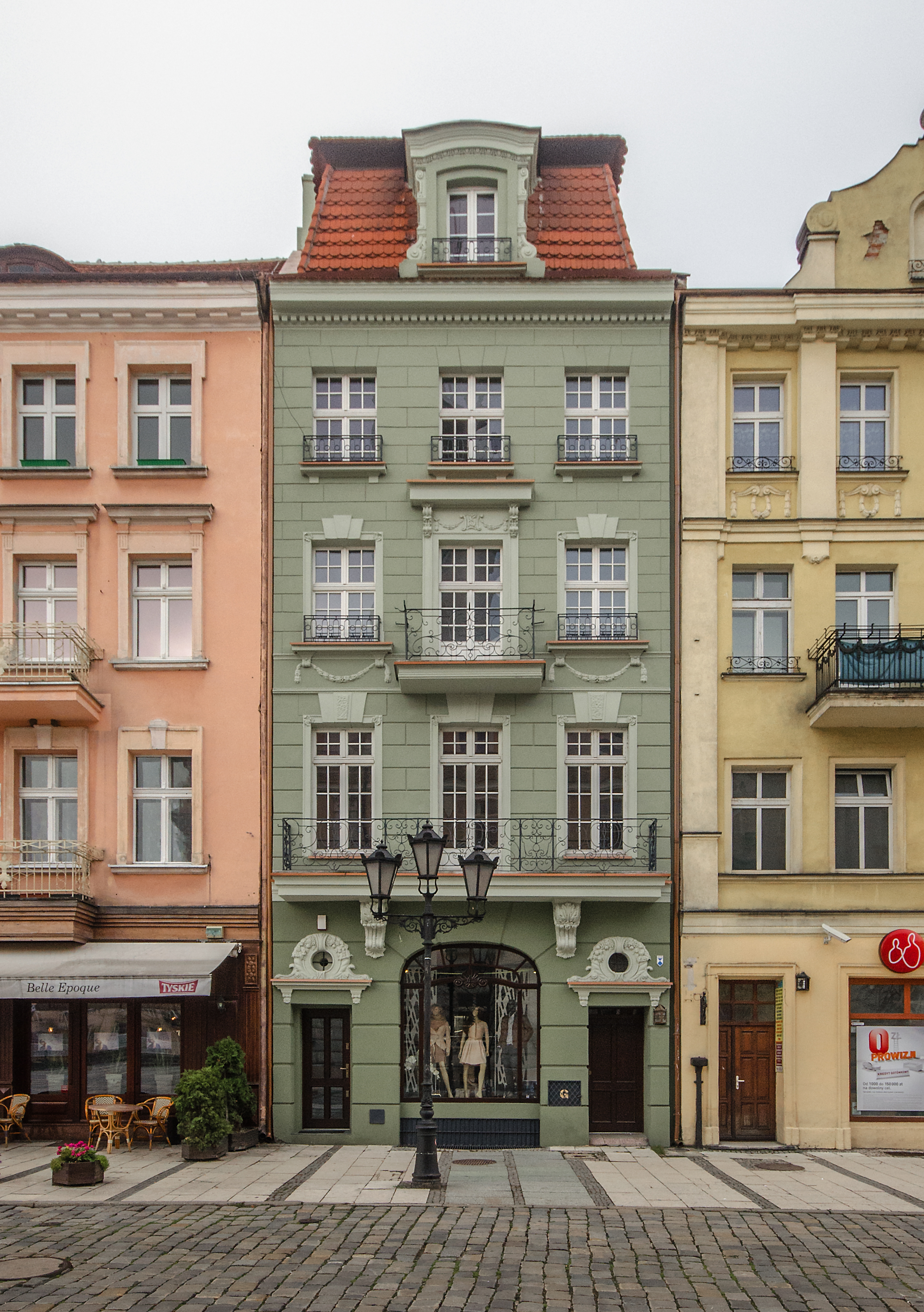 Kalisz, dom, 1824, 1927